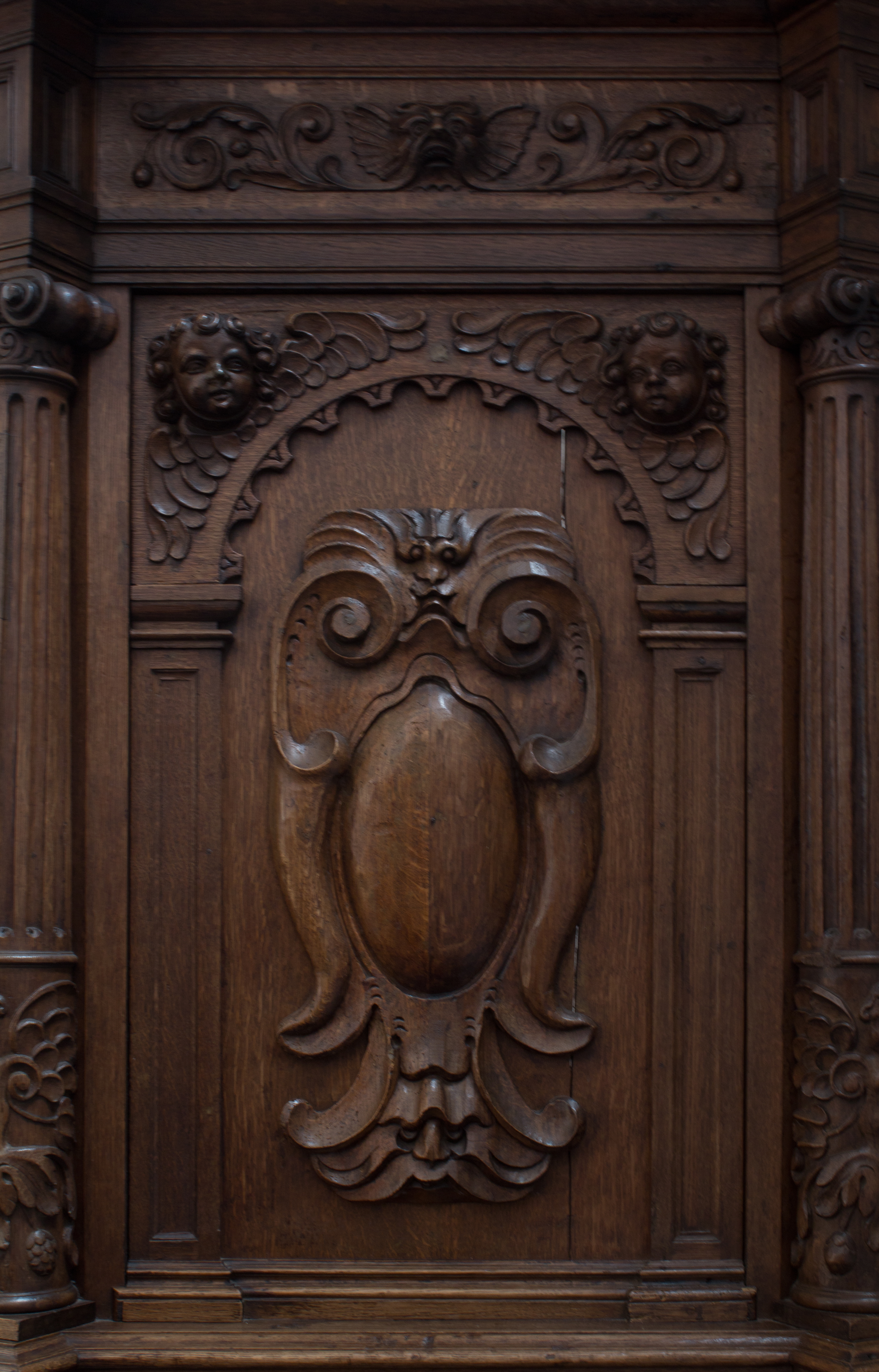 Protestantse kerk Grave, Detail van de preekstoel